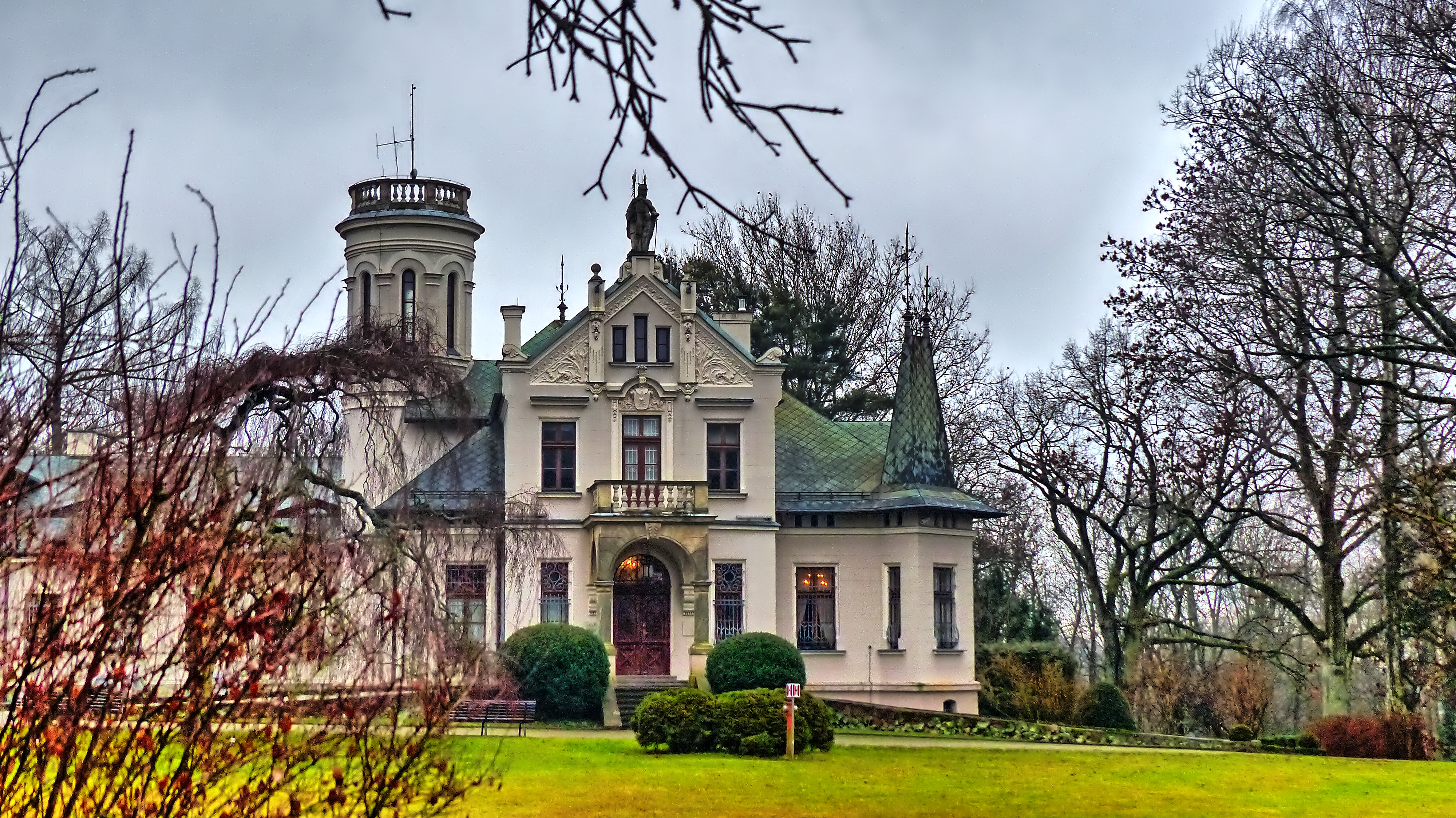 Oblęgorek, zespół pałacowy